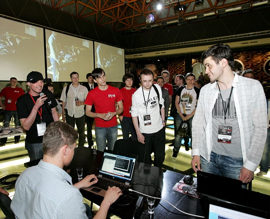 Участники соревнований на Positive Hack Days в 2011 году